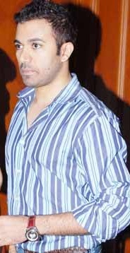 kamaal khan